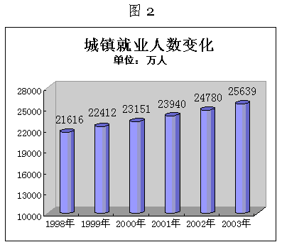 《中国的就业状况和政策》白皮书 图2